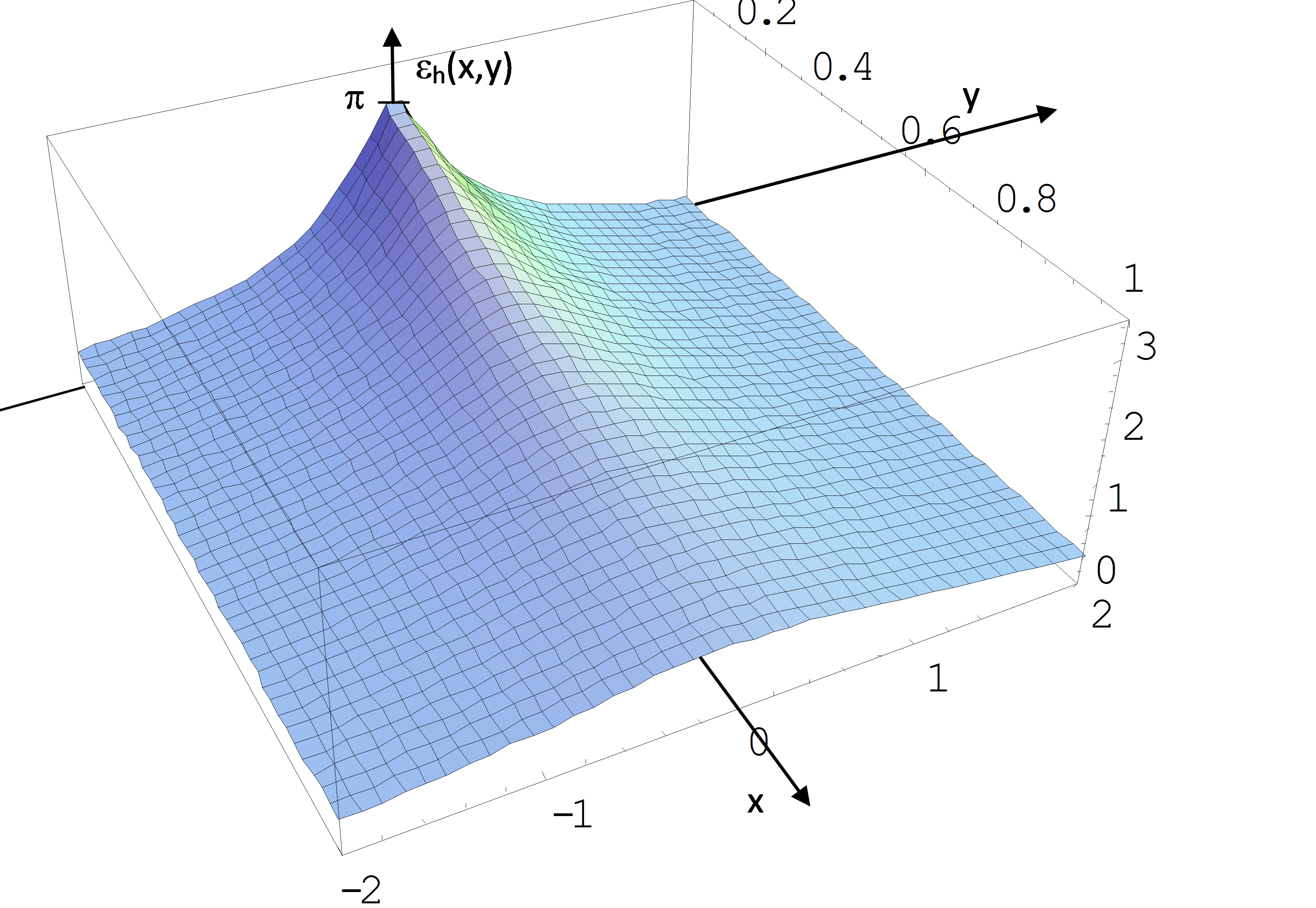 Graph des horizontalen Sehwinkels als Funktion von zwei Ebenenkoordinaten